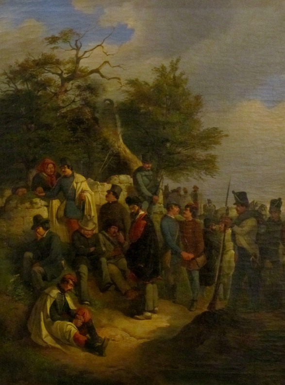 Revolution 1848